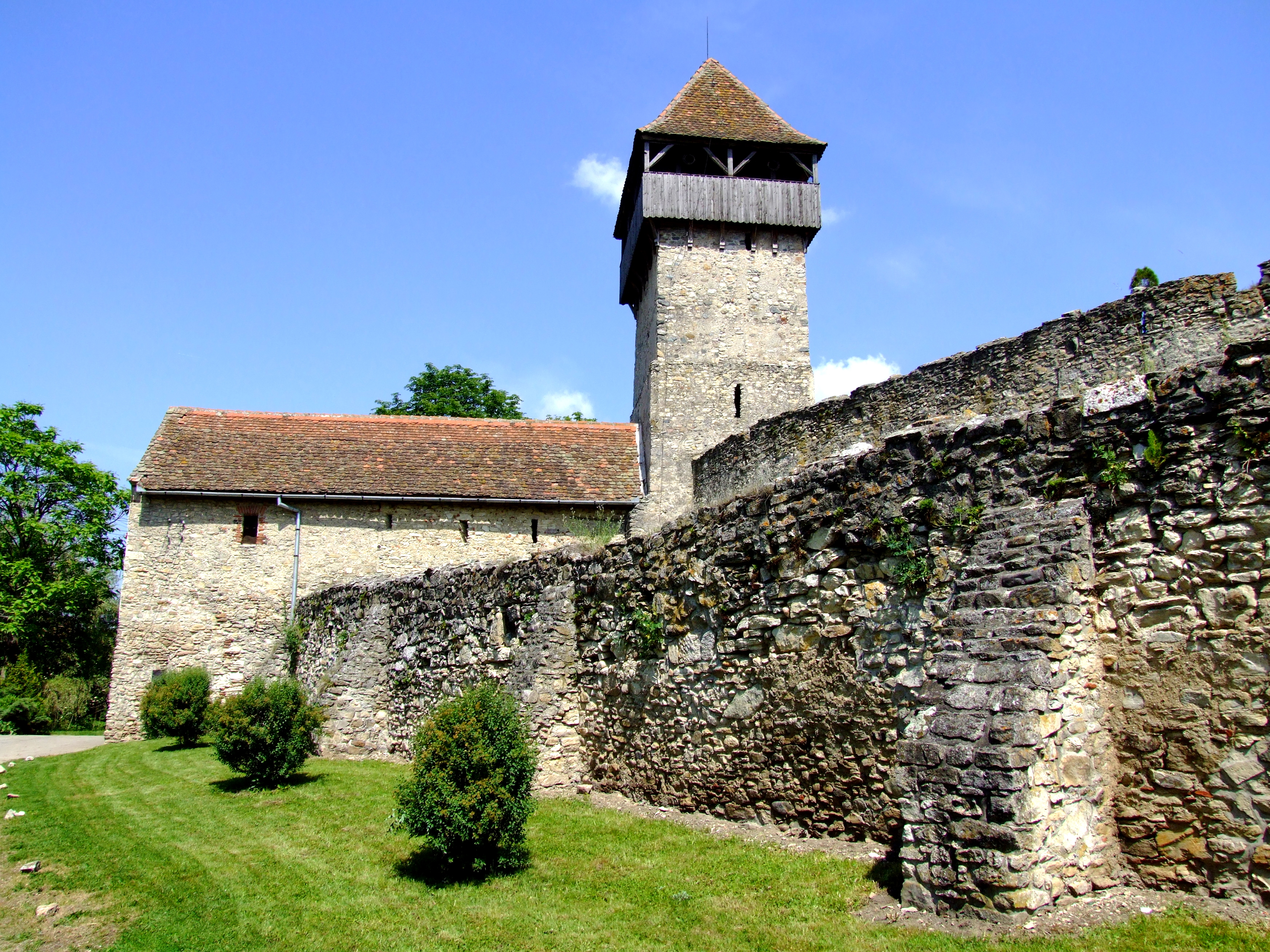 Câlnic fort 04